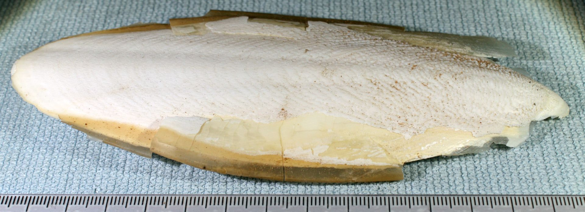 Oversiden av hvalsprø, en struktur inne i ryggen til sepiablekksprut Sepia officinalis og andre. Det gir oppdrift og stiver av kroppen. Template:Byline